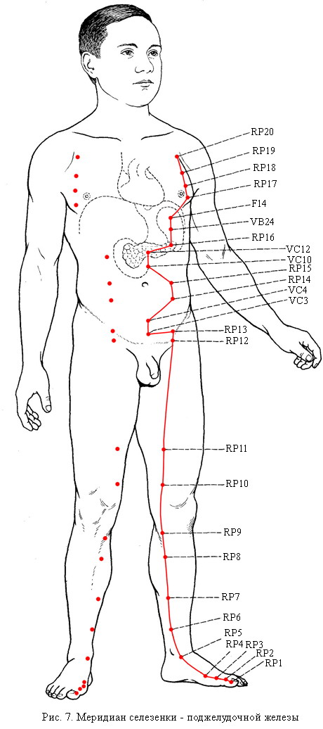 Меридыан селезынки-пыдшлунковоъ залози